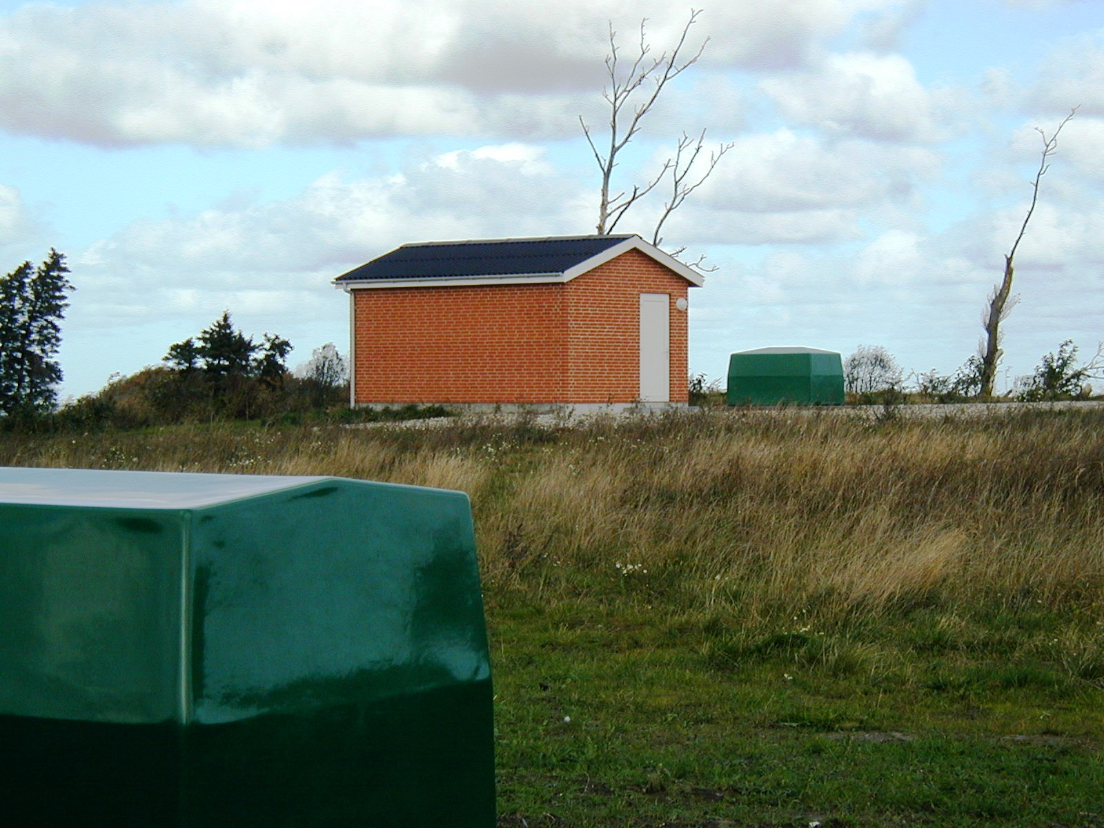 Skørping Vandværk